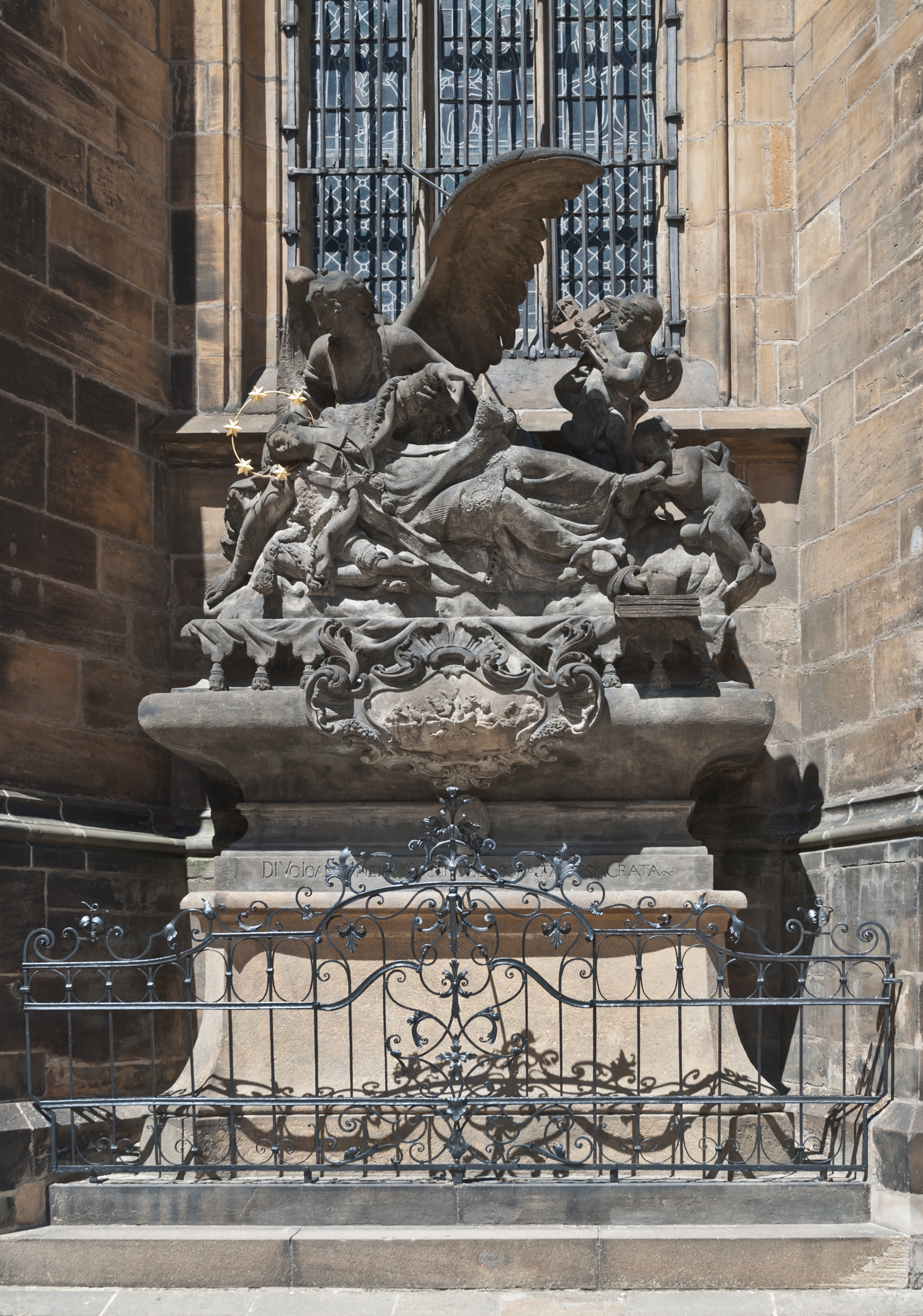 Praga, katedra św. Wita